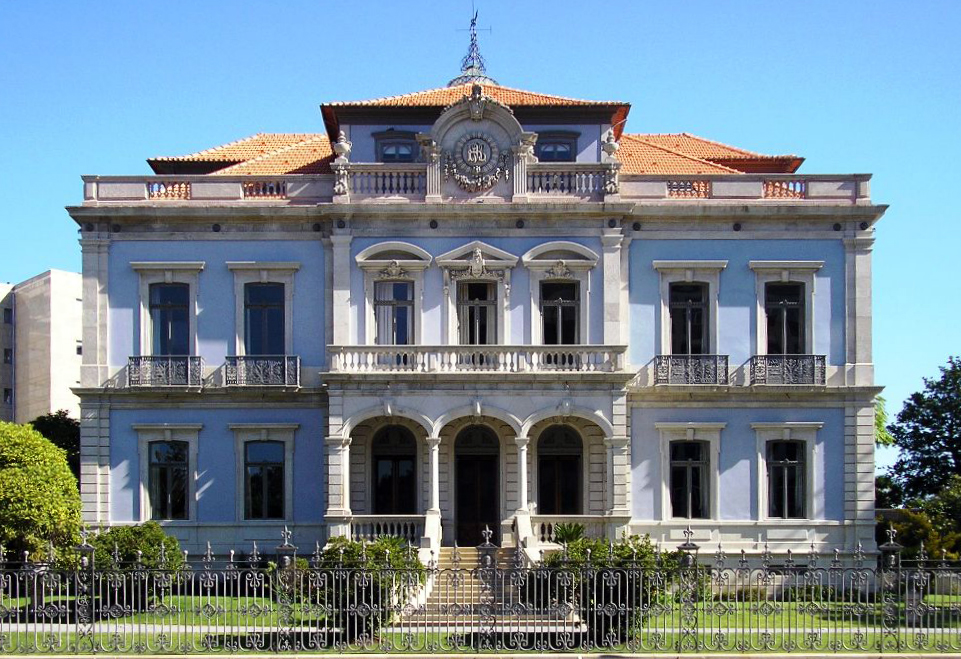 Old "Colégio dos Maristas" in Porto, Portugal